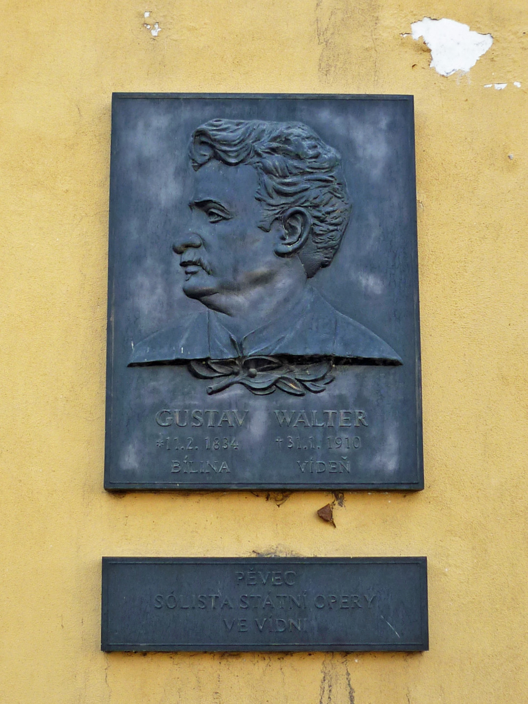 Tafel Gustav Walter am Haus 21/16 in Bilin (Bílina)